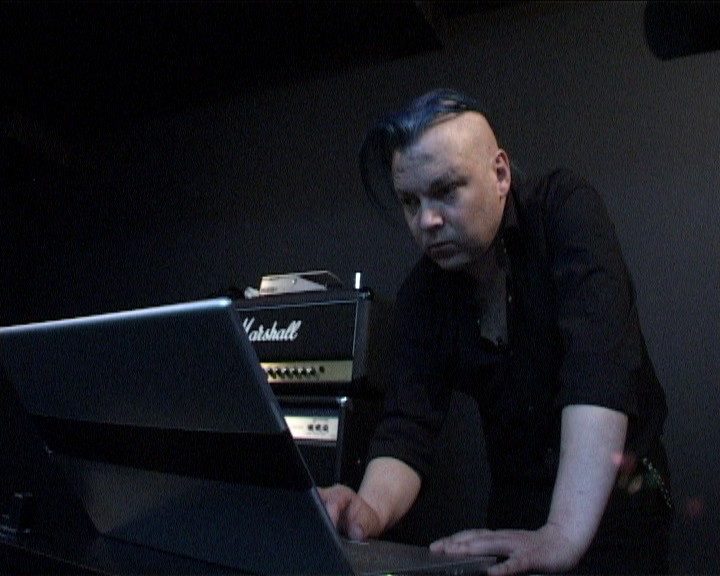 K.T.Toeplitz is working at Kernel#2